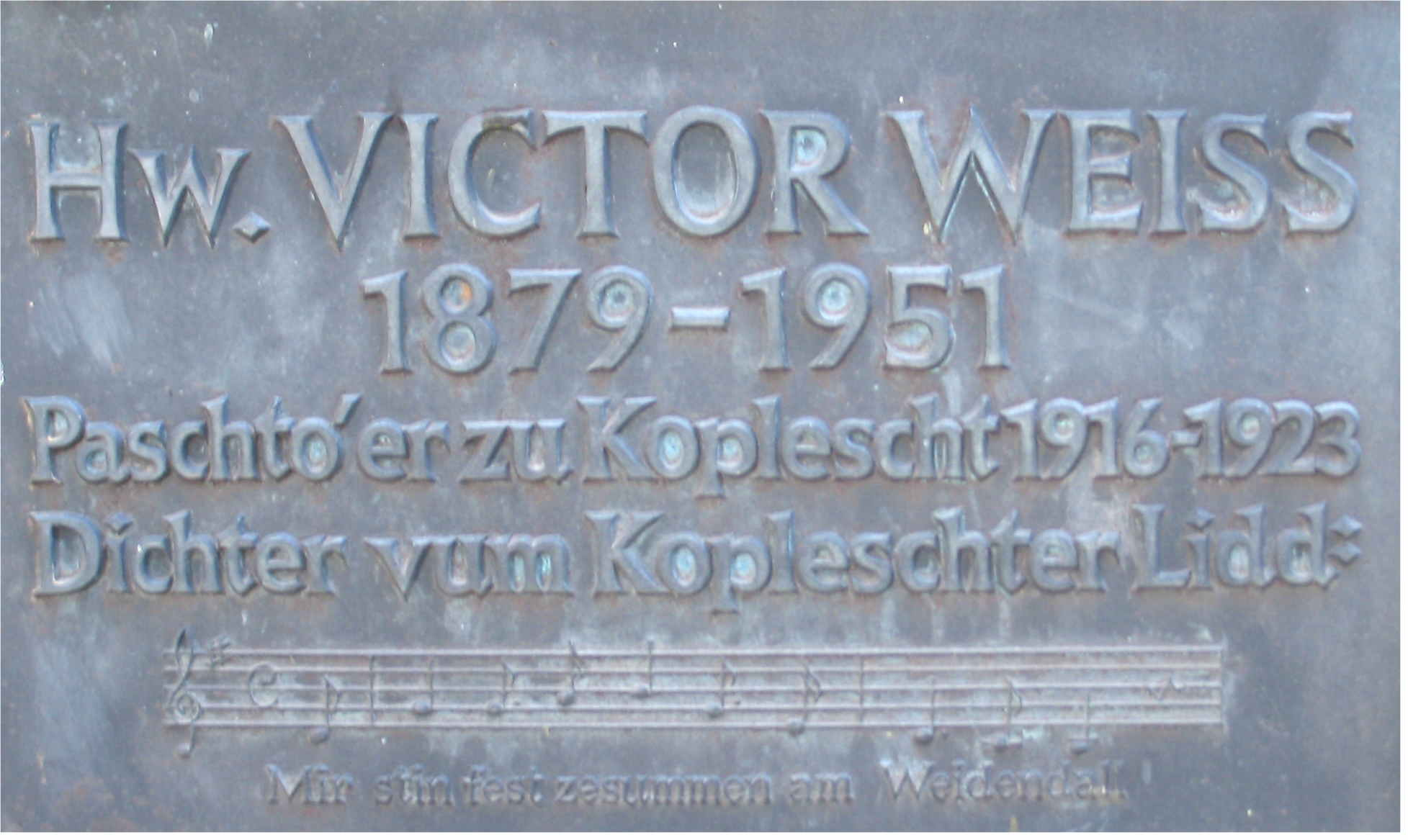 Détail aus dem Monument fir de Victor Weiss, Paschtouer zu Koplescht Kategorie:Gemeng Koplescht